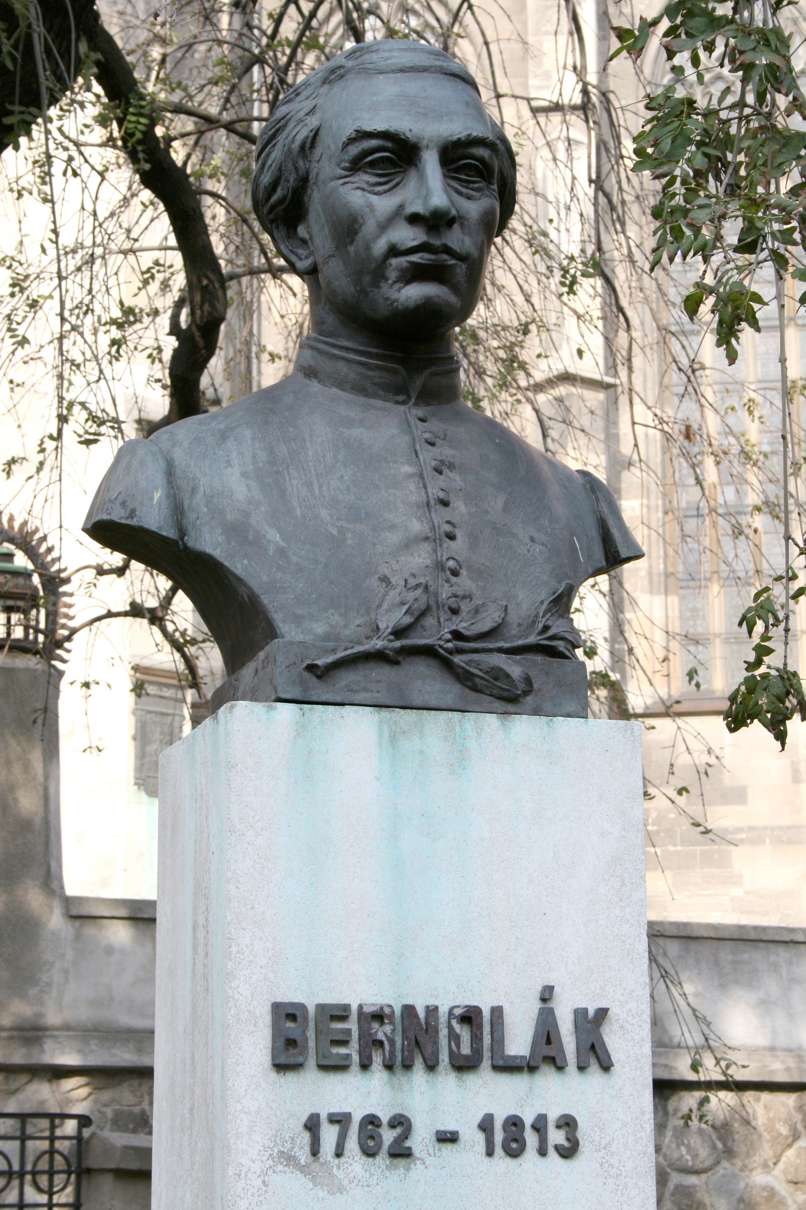 Busta Antona Bernoláka z roku 1937 na Rudnayovom námesti v Bratislave